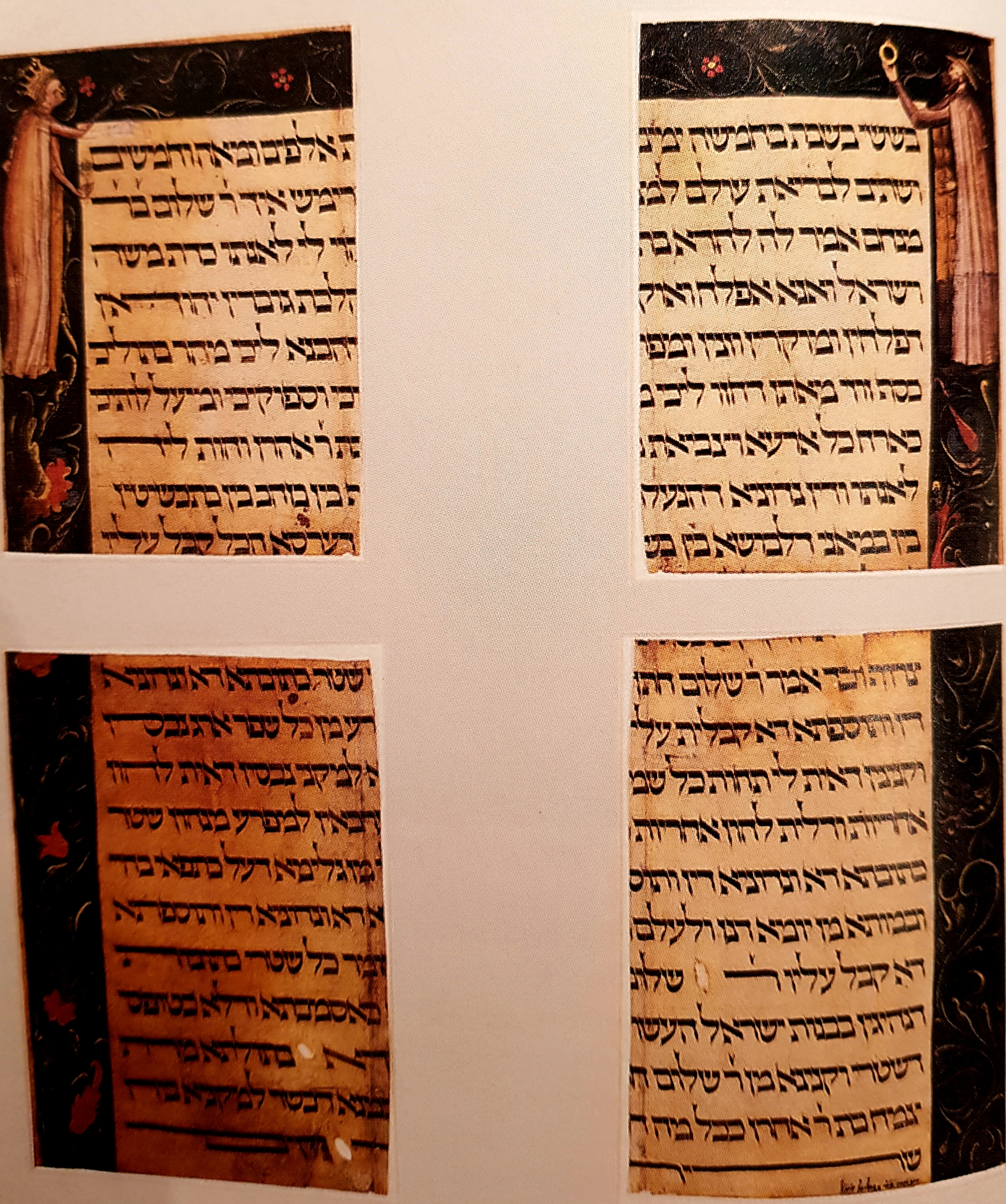 Kremser Heiratsurkunde aus dem 14. jahrhundert